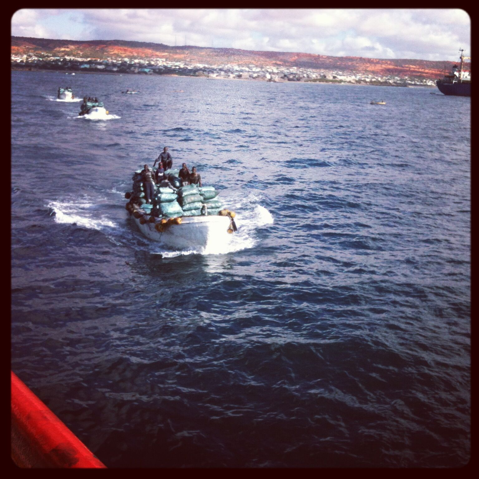 Soomaaliga: baraawe dhuxul